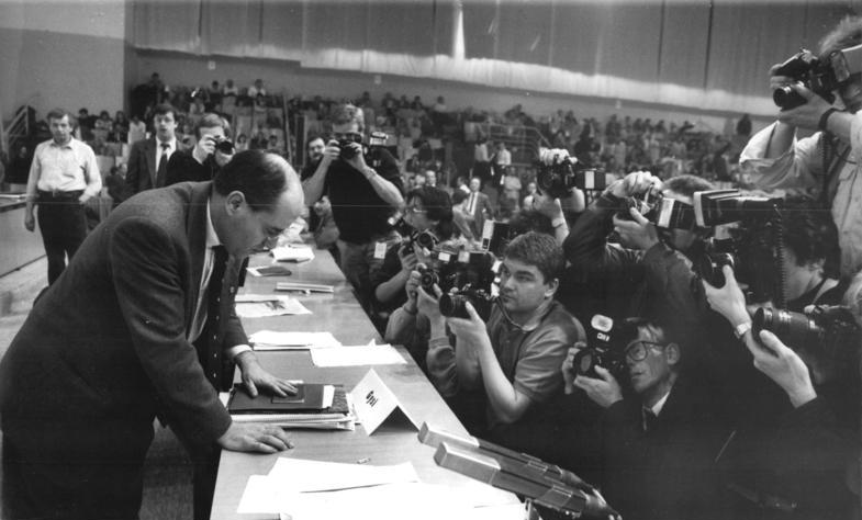 ADN-ZB Mittelstädt-9.12.89 hko- Berlin: Der neugewählte Vorsitzende der SED, Dr. Gregor Gysi, stellte sich unmittelbar nach Bekanntgabe der Wahlergebnisse den Fragen in- und ausländischer Journalisten.